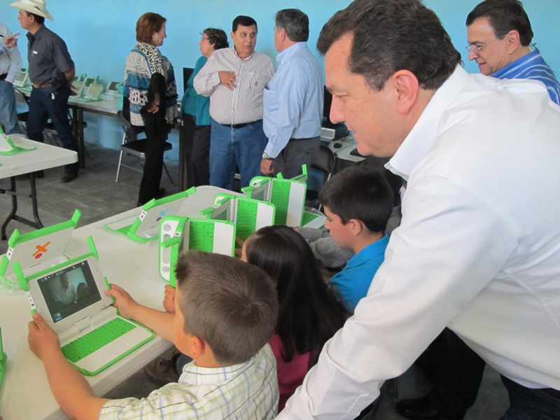 Entrega de equipos del programa Un Nuevo Futuro en Banámichi.